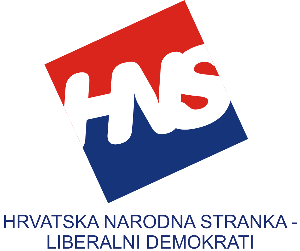 Logo der HNS, einer politischen Partei in Kroatien